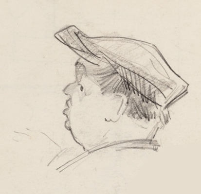 Schetstekening van Hans Krieg, gemaakt in kamp Westerbork (detail van de schets "Hans Krieg en een saxofonist")